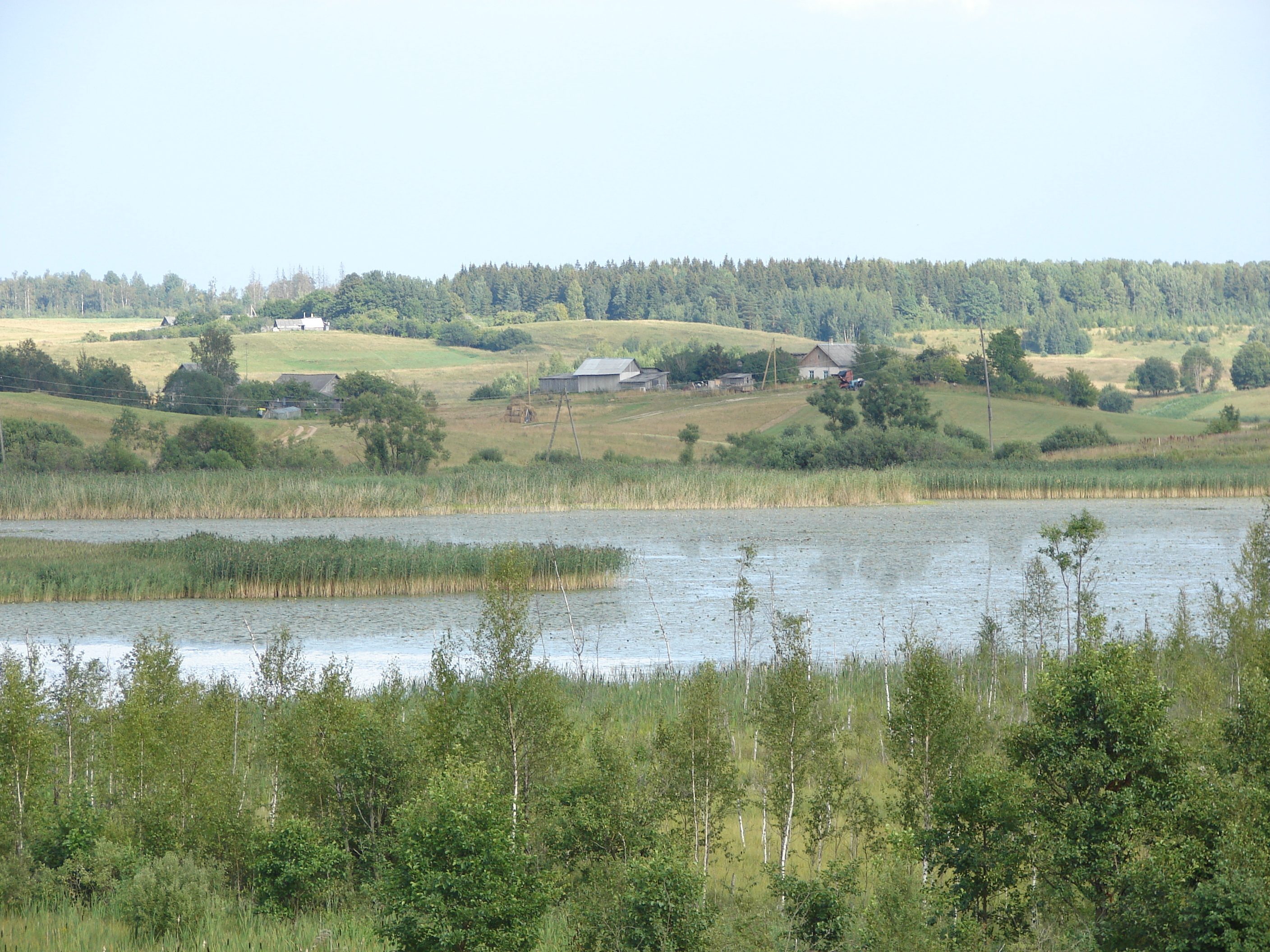 Puderovas ezers, Audriņu pagasts, Rēzeknes novads, Latvia